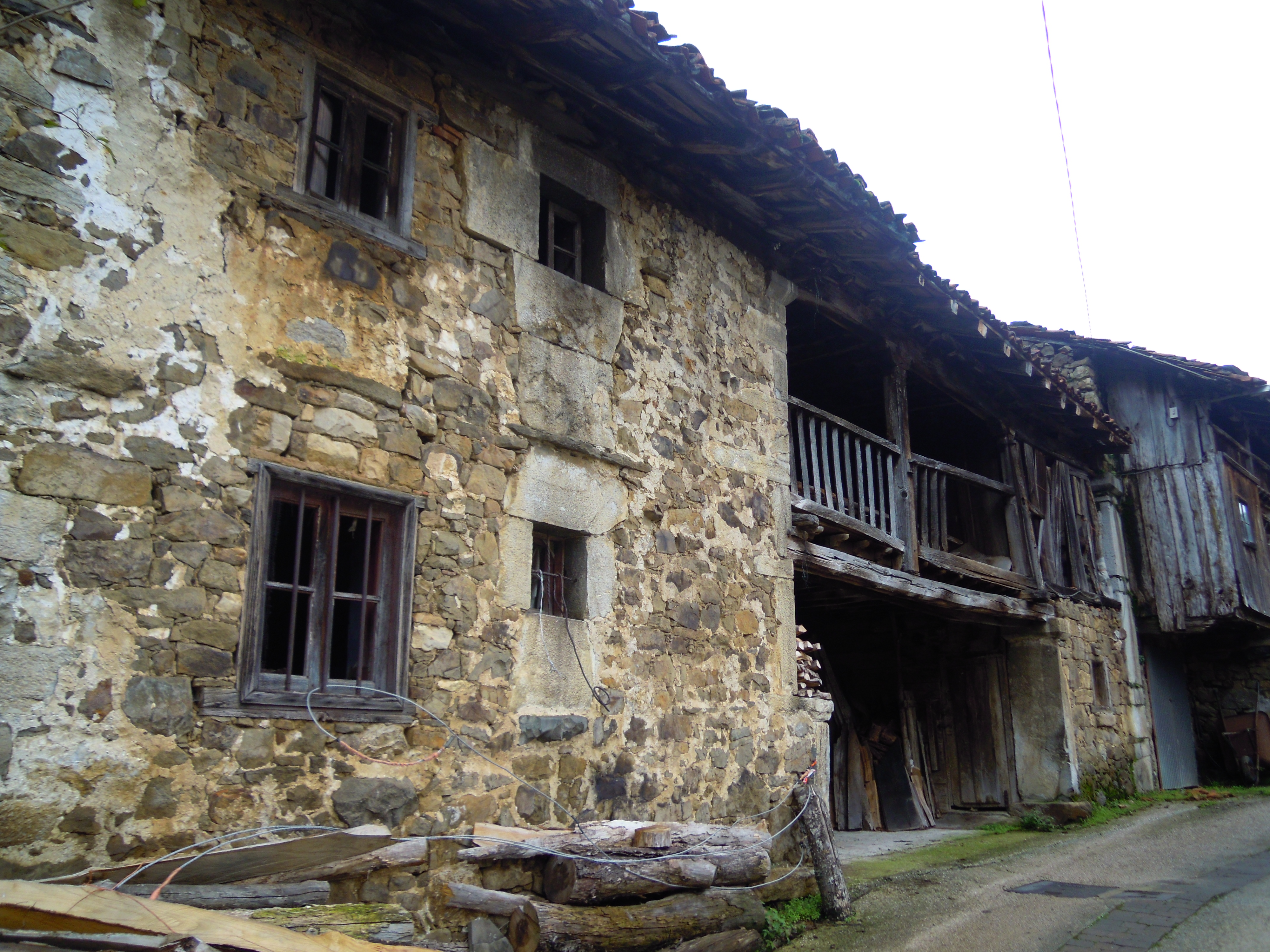 (Casu)